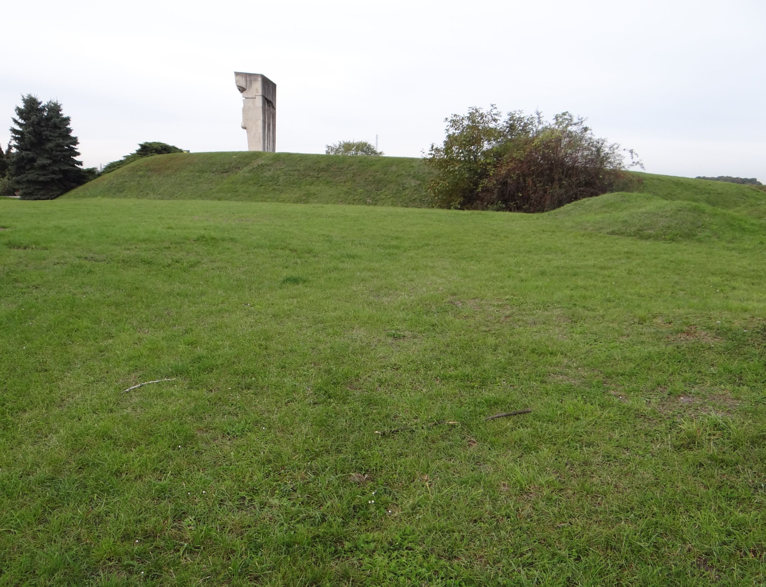 Pomnik ofiar faszyzmu na terenie niemieckiego obozu koncentracyjnego Plaszow